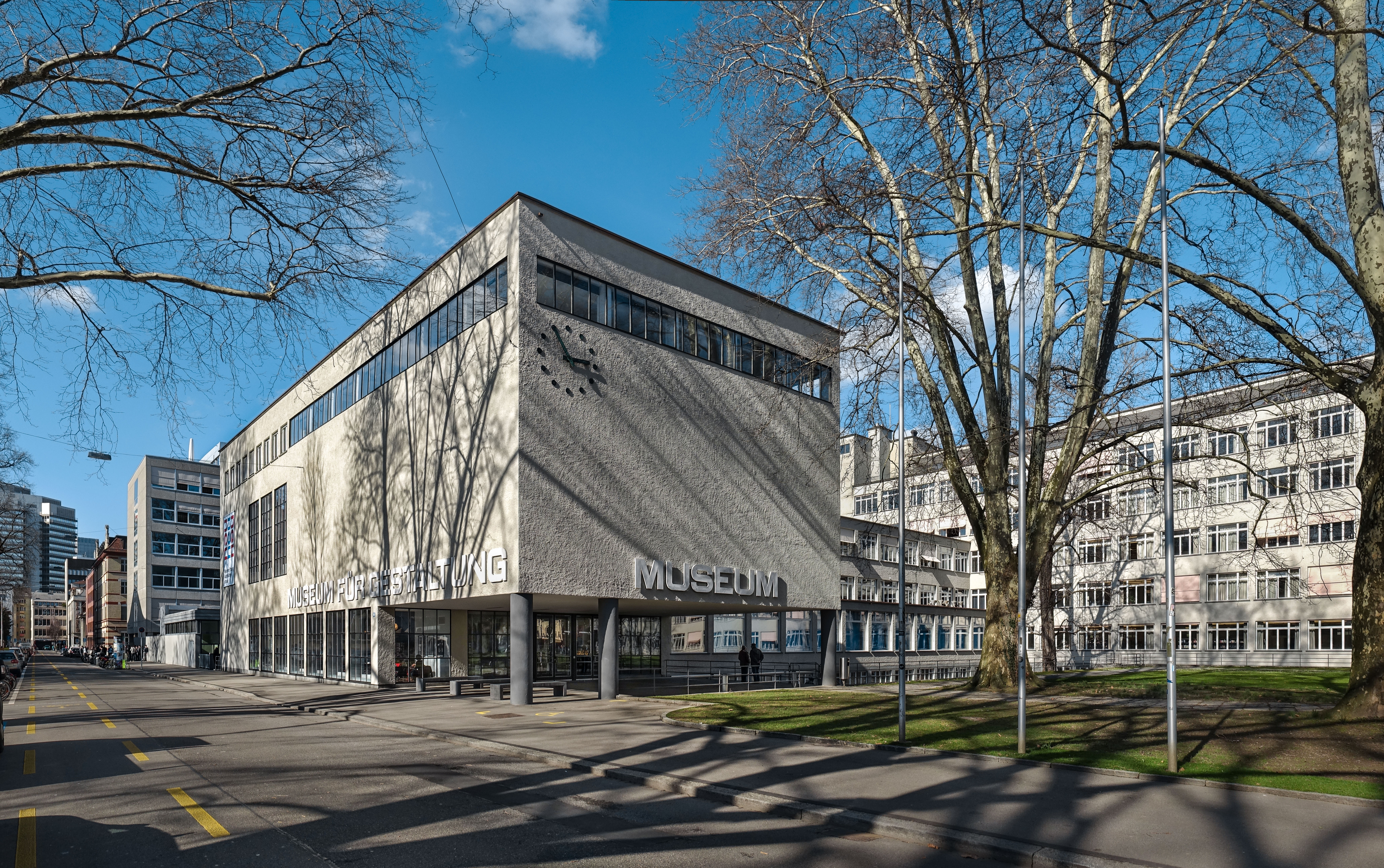 Museum für Gestaltung. Zürich. Ausstellungsstrasse 60. 8031 Zürich.